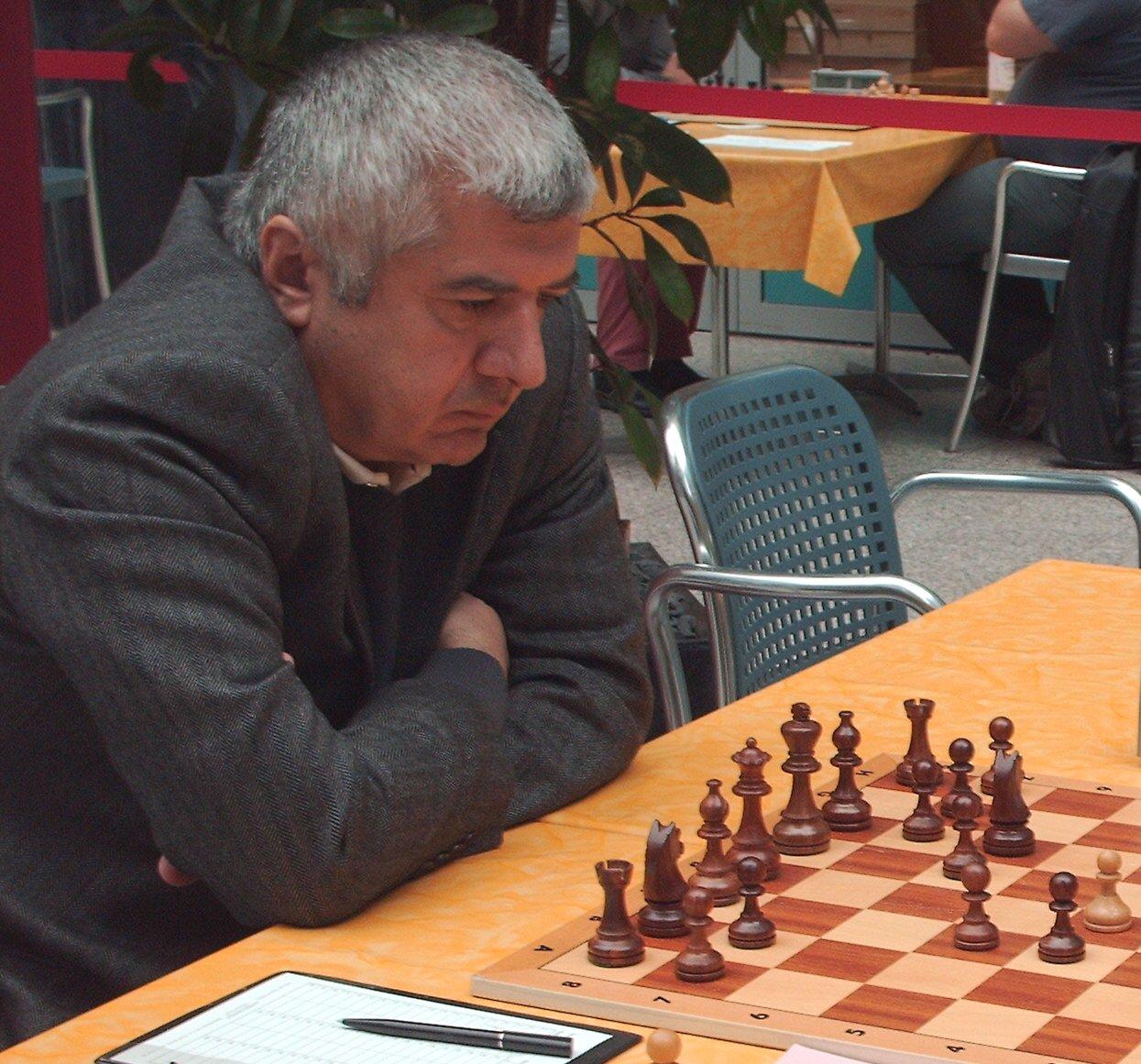 Rafael Waganjan am 29. Oktober 2006 bei einem Bundesliga-Wettkampf in Berlin-Tegel